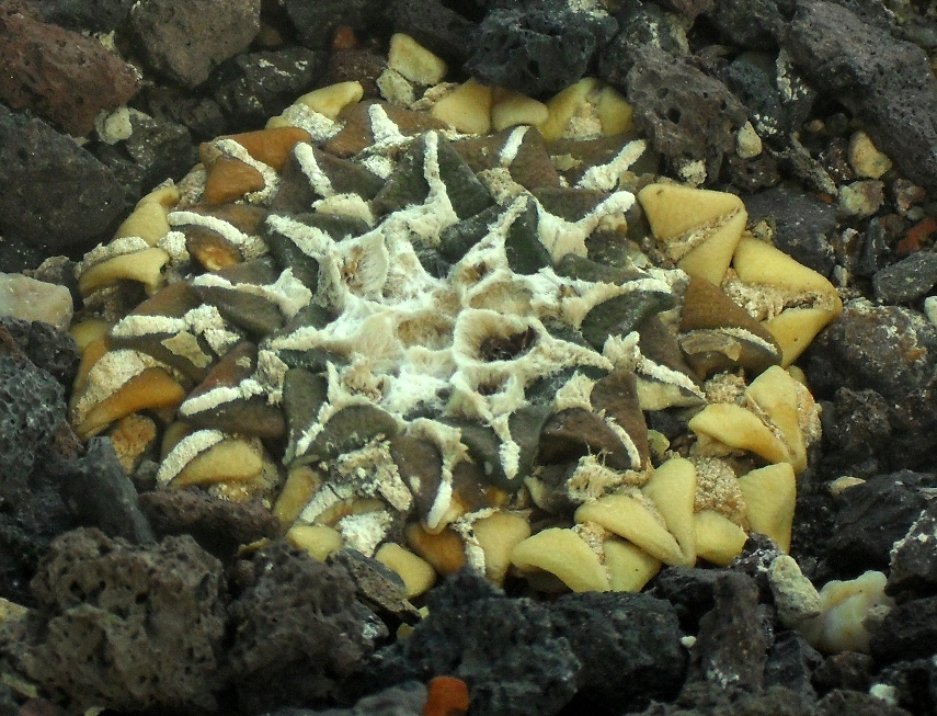 Ariocarpus kotschoubeyanus - Botanischer Garten Leipzig